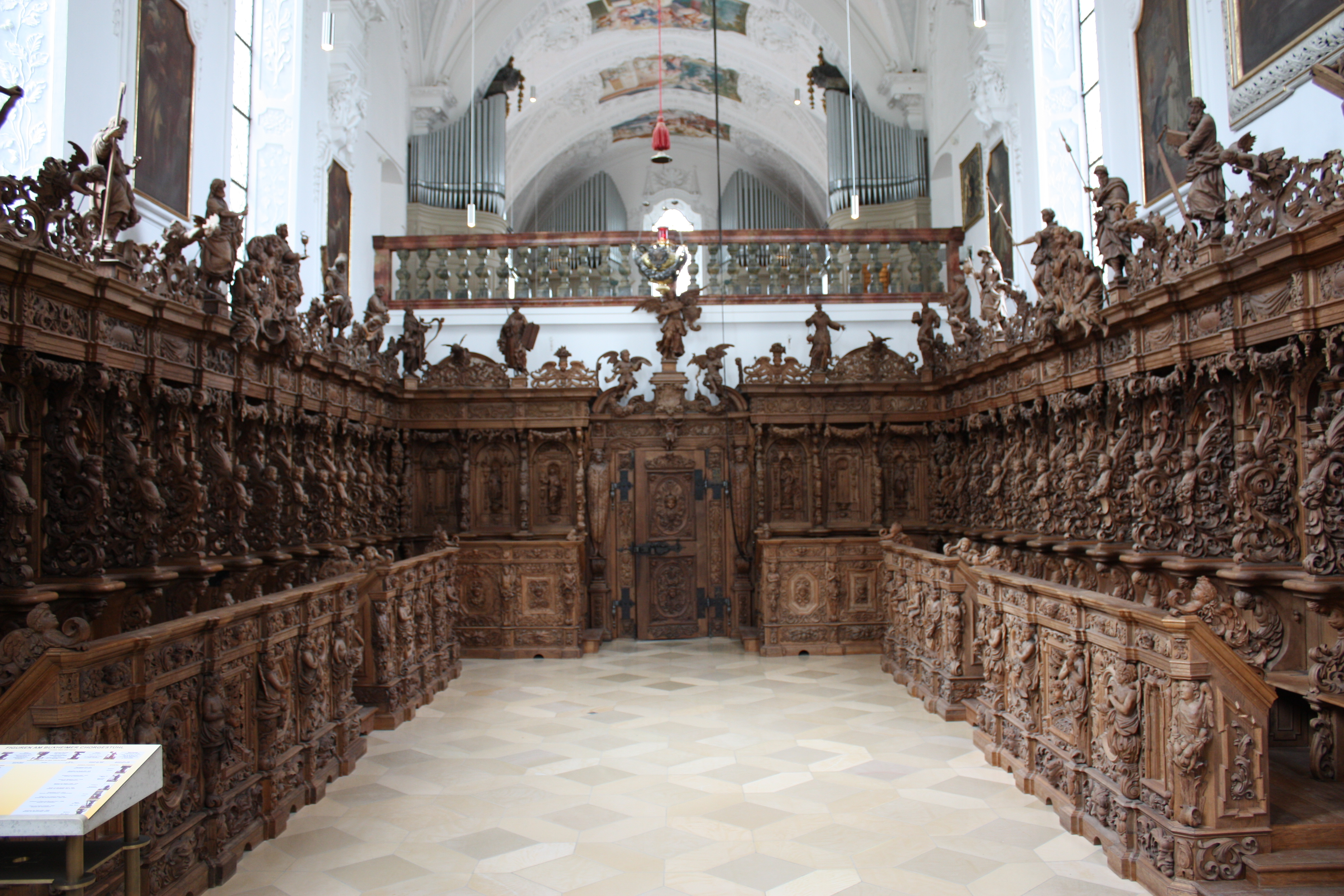 Chorgestühl in der ehemaligen Klosterkirche der Kartause in Buxheim bei Memmingen